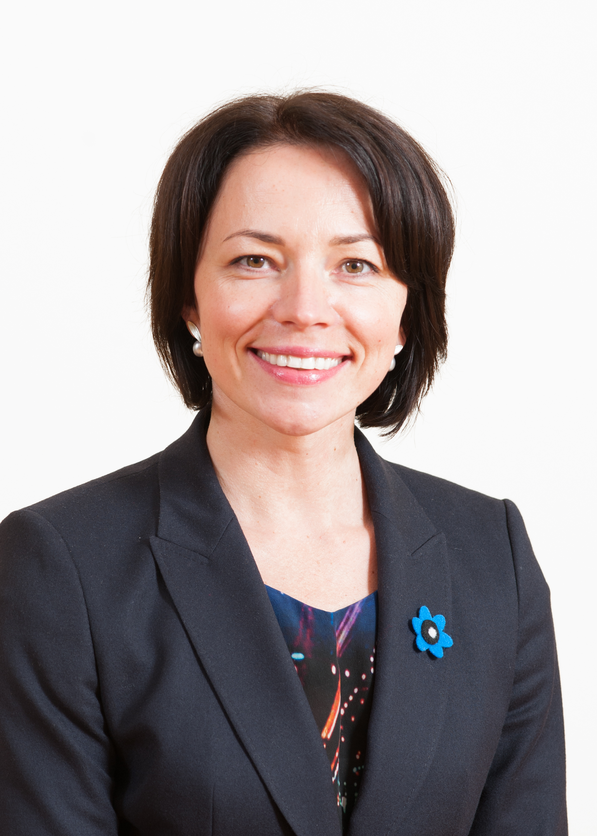 Liina Kersna